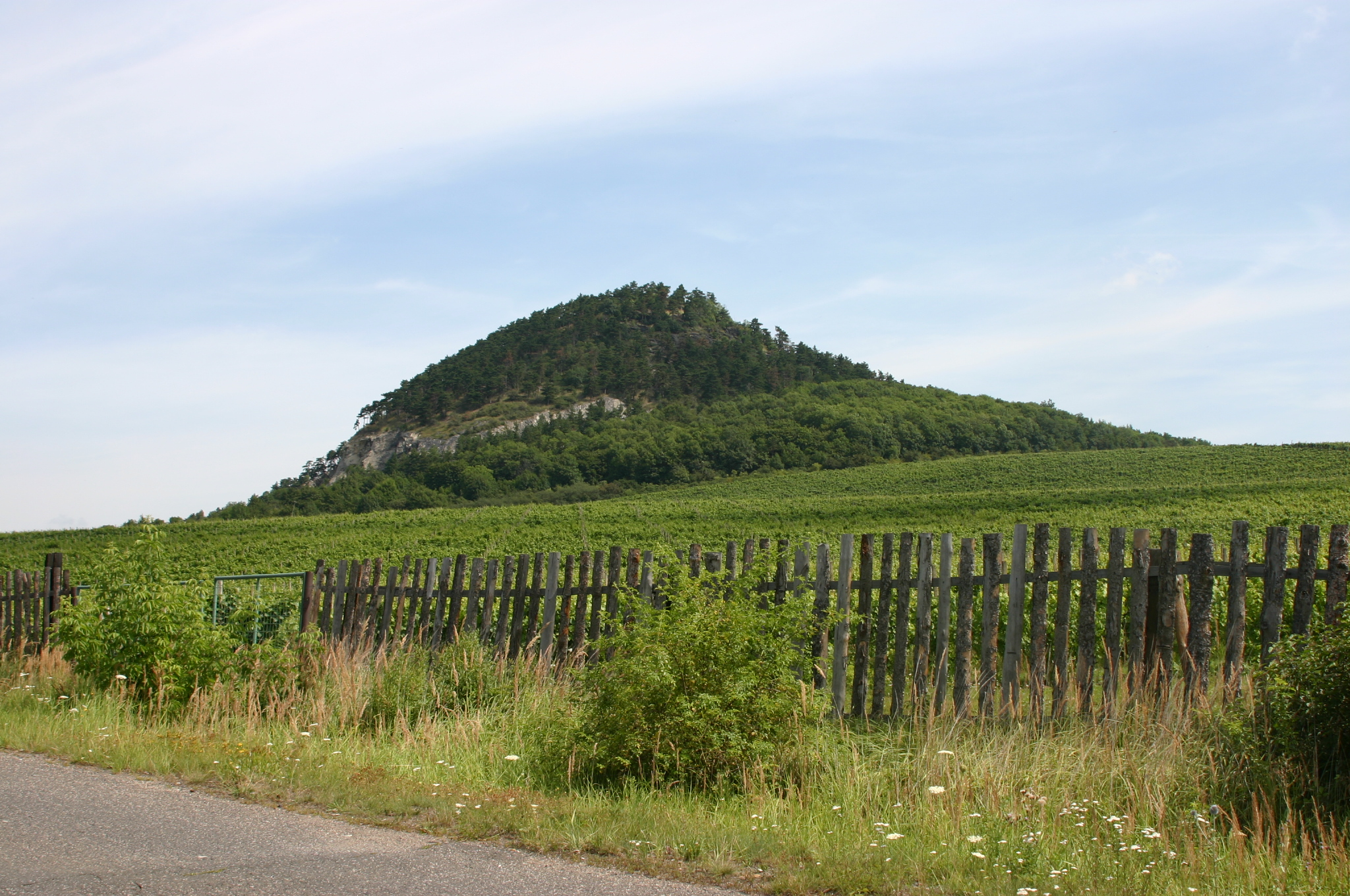 Kopec Špičák v okrese Most